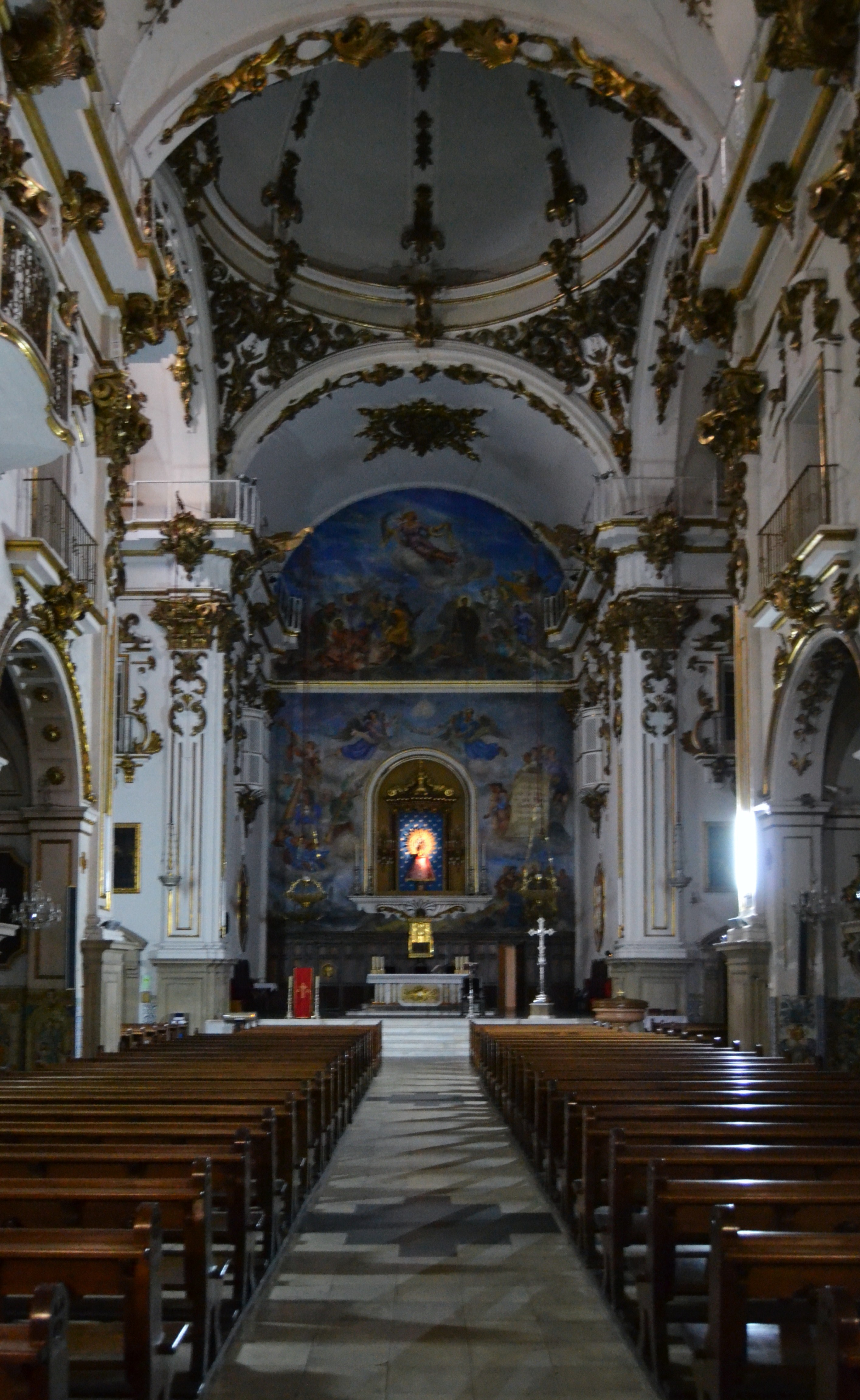 Interior de l'església del Pilar, València.